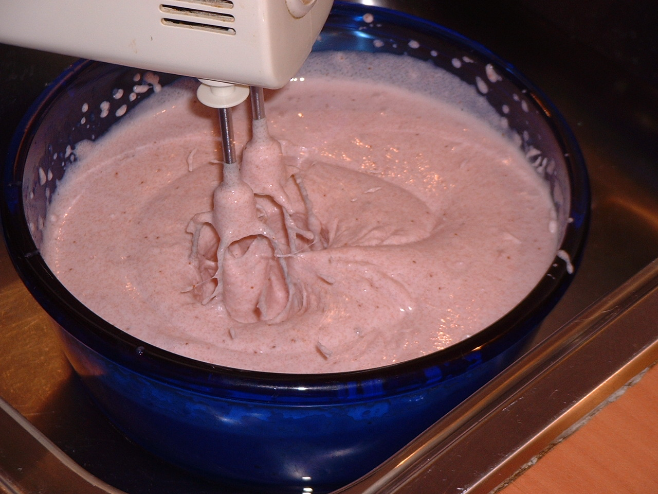 Vispgröt / Klappgröt